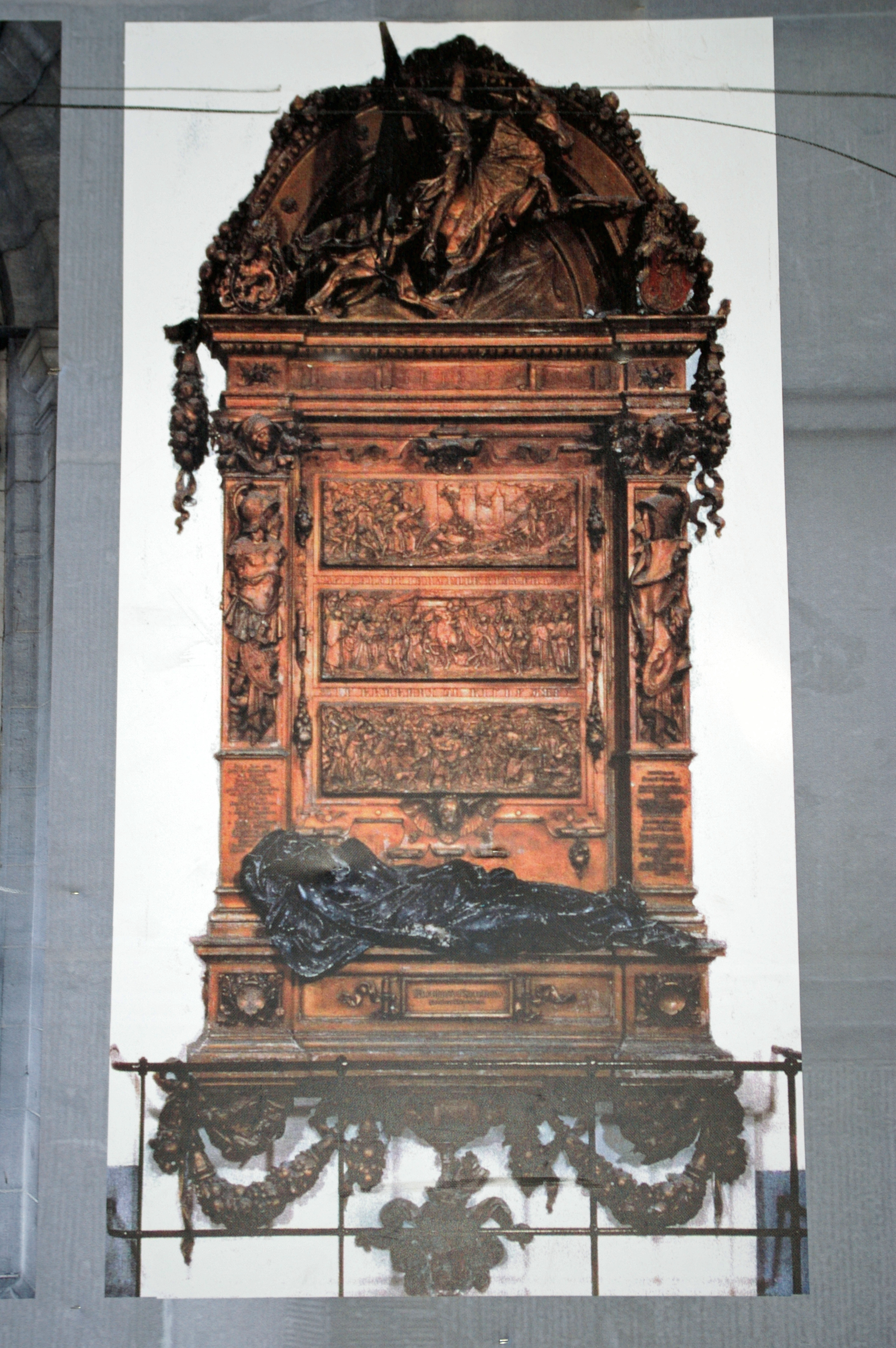 Bruxelles-Centre - Grand-Place - 1902 Everard 't Serclaes (?1320-1388) par Julien Dillens (1849-1904)